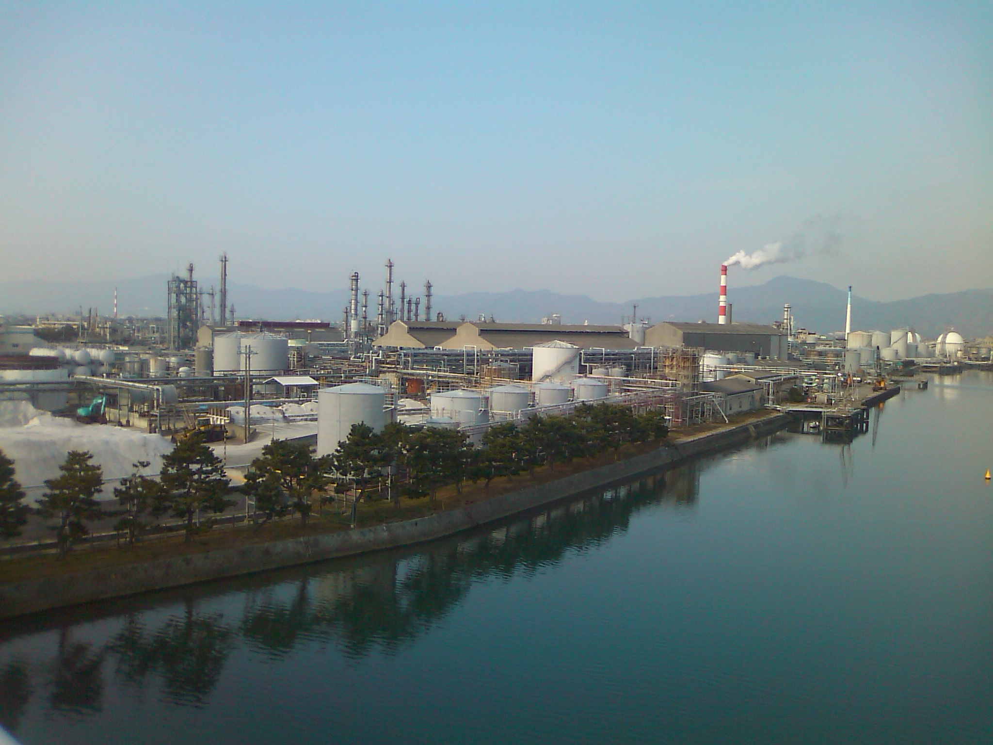 徳島県道29号の共栄橋から見た東亞合成徳島工場。北西の方向を見る。